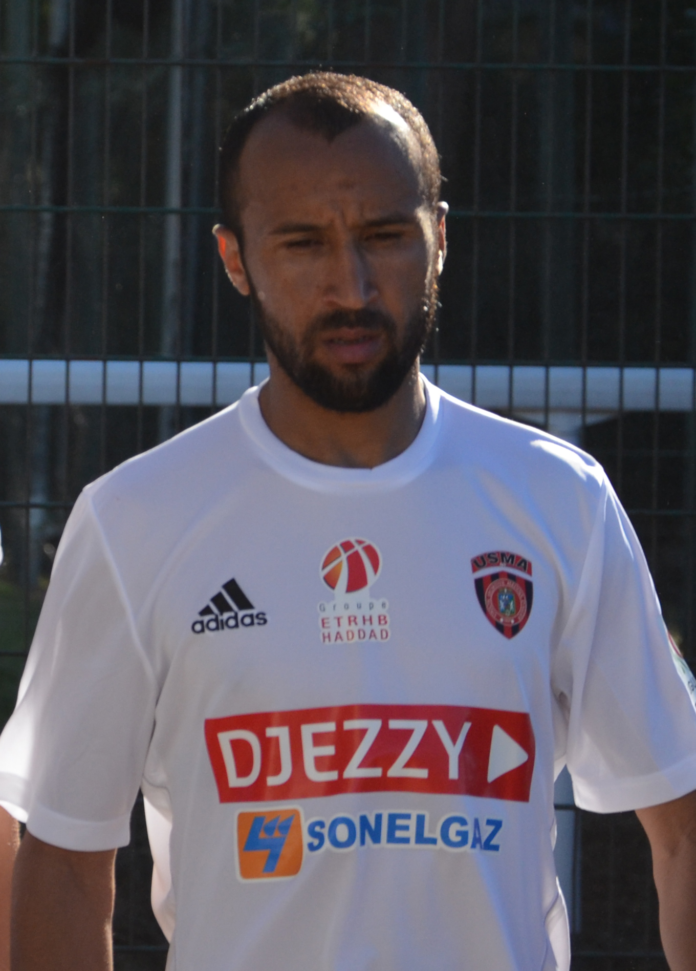 Photographie prise lors du match opposant le Stade rennais à l'USM Alger en match amical au stade Paul-Audrin de Dinard le 16 juillet 2016. Ici, Nacereddine Khoualed.